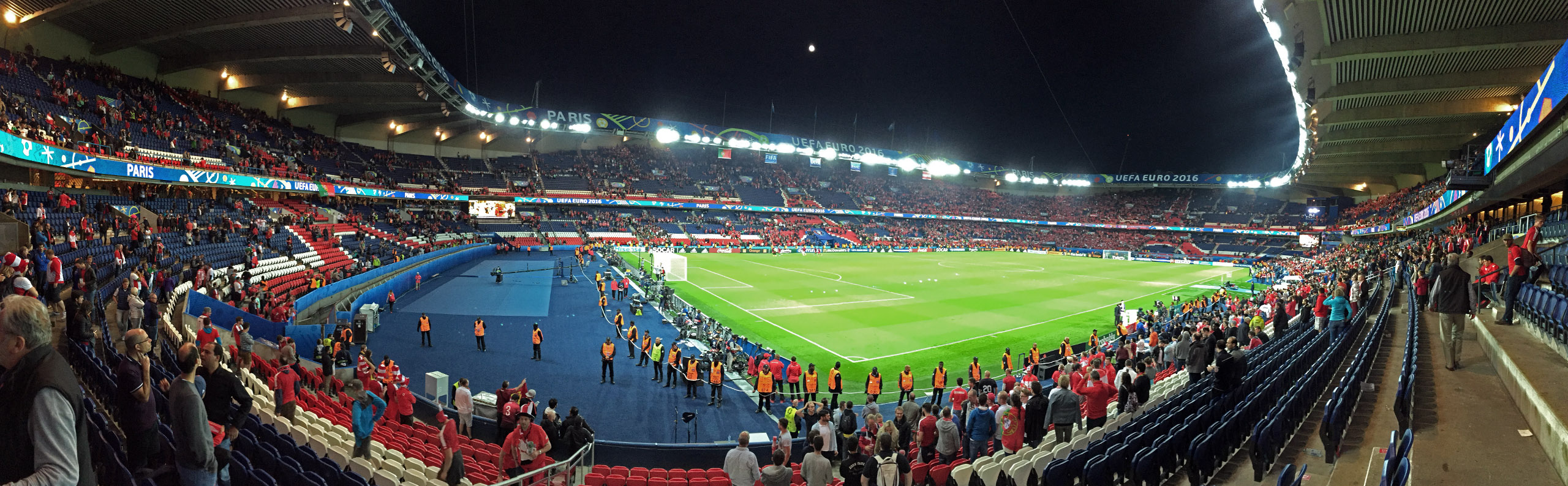 Portugal - Austria 0:0 UEFA Euro 2016 Group F, Parc des Princes 18-Jun-2016